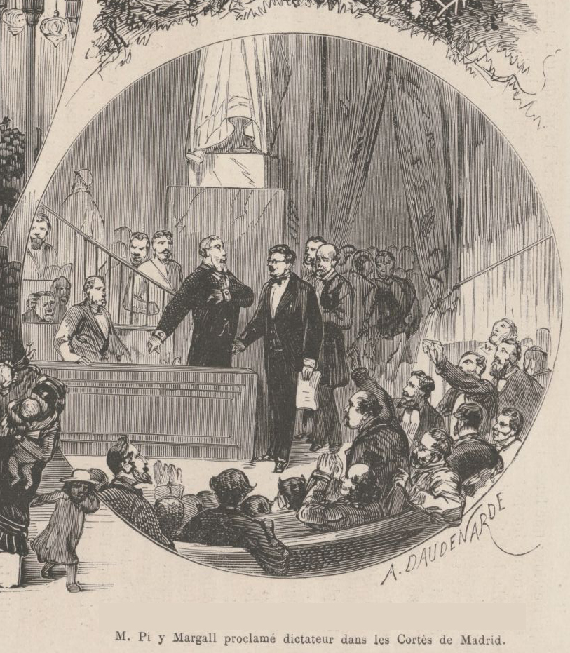 Faits divers)